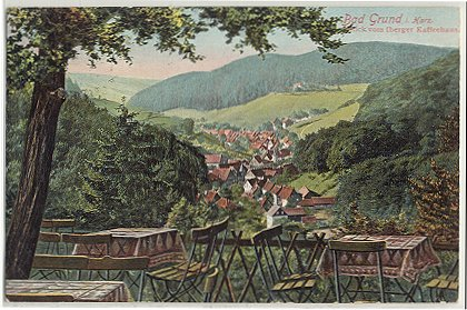 Bad Grund vom Iberger Kaffeehaus gesehen